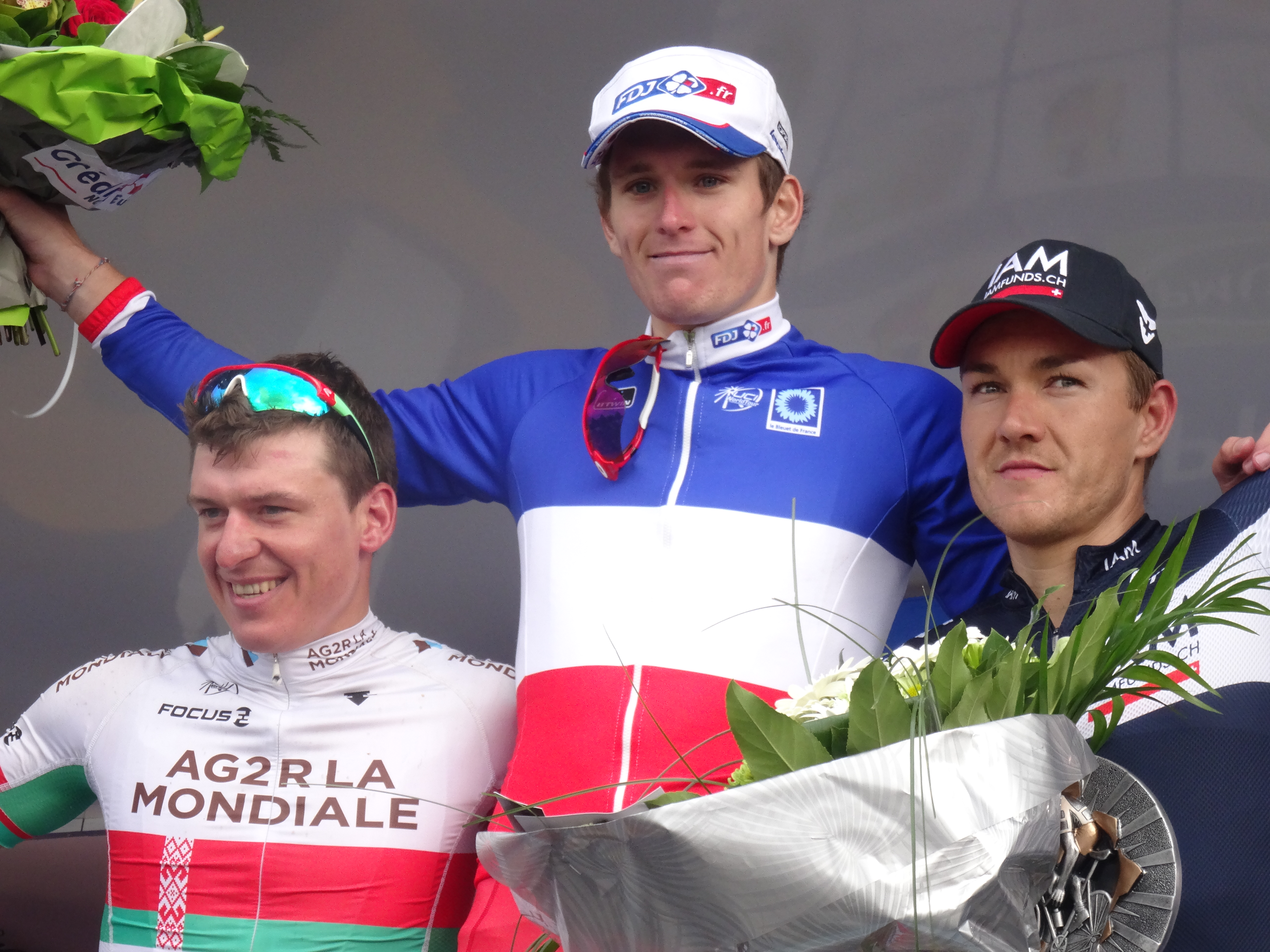 Reportage photographique réalisé le dimanche 21 septembre à l'occasion du départ et de l'arrivée du Grand Prix d'Isbergues 2014 à Isbergues, Nord-Pas-de-Calais, France.